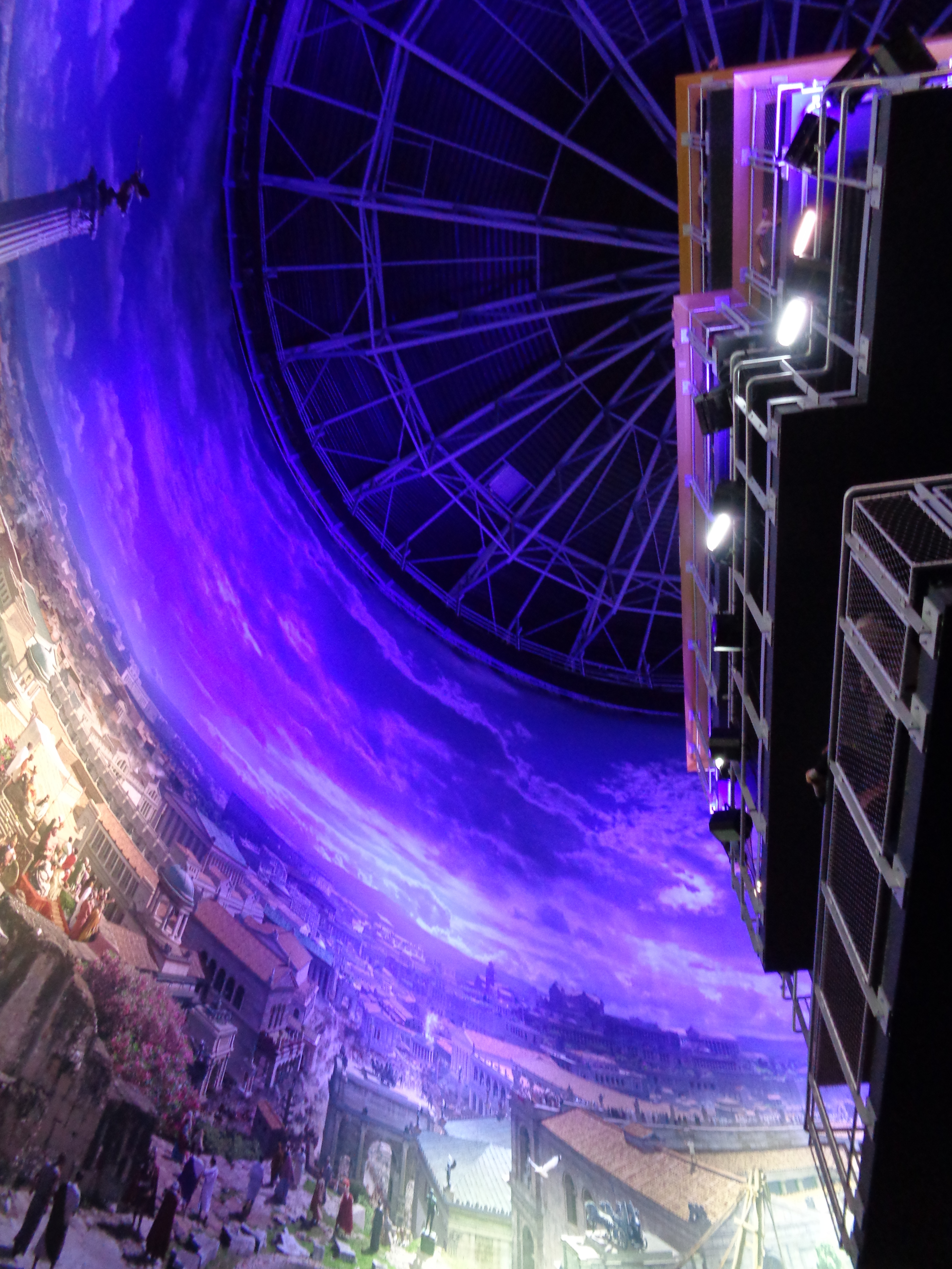 Exposition Rome 312